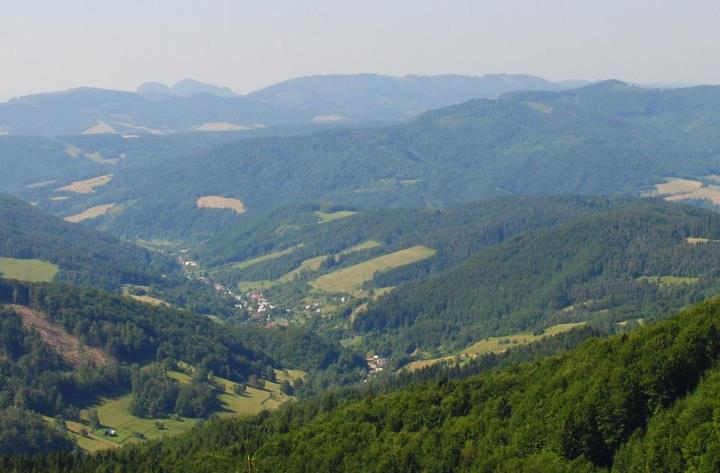 Vydrná